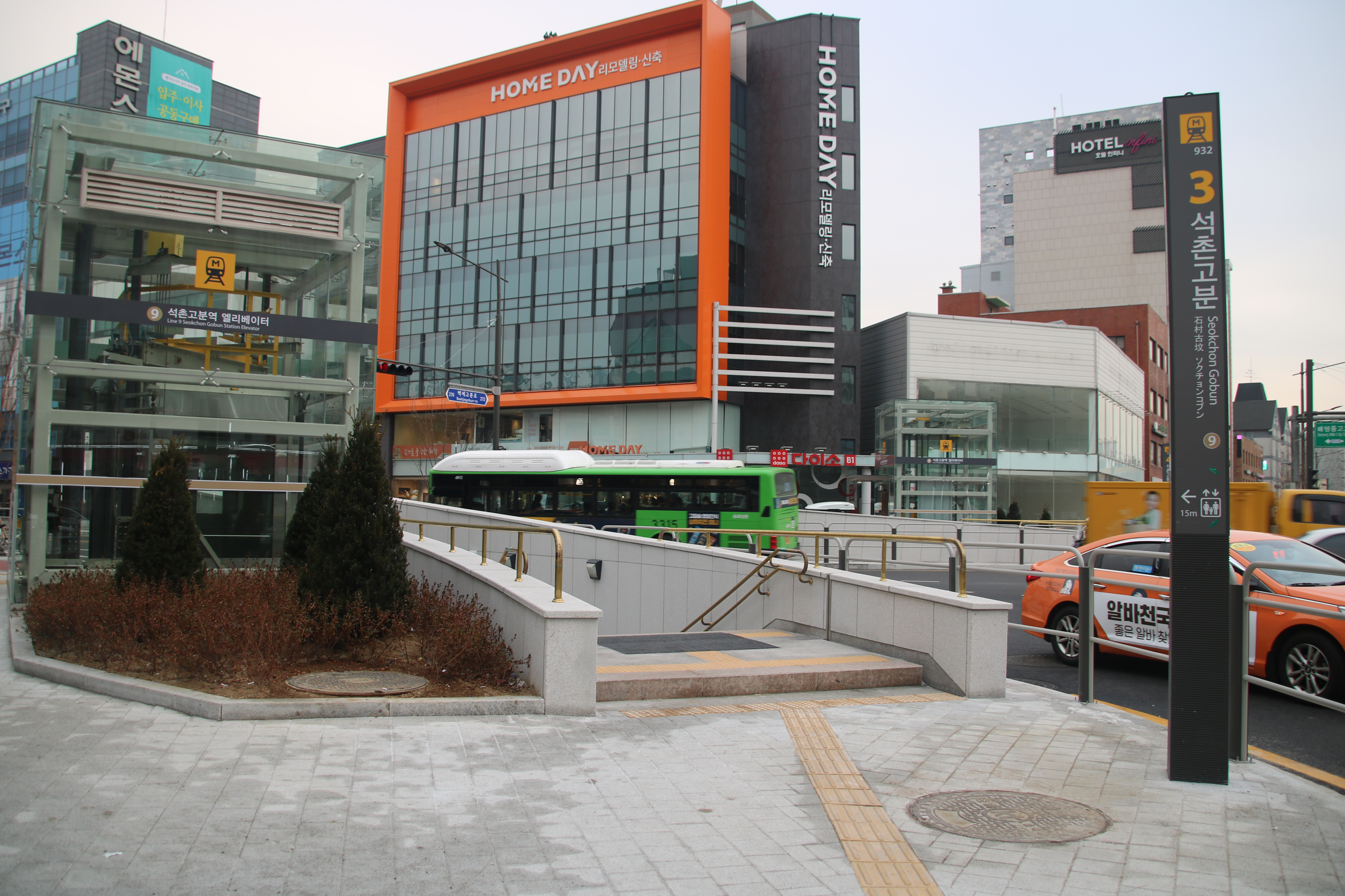 석촌고분역 3번 출입구